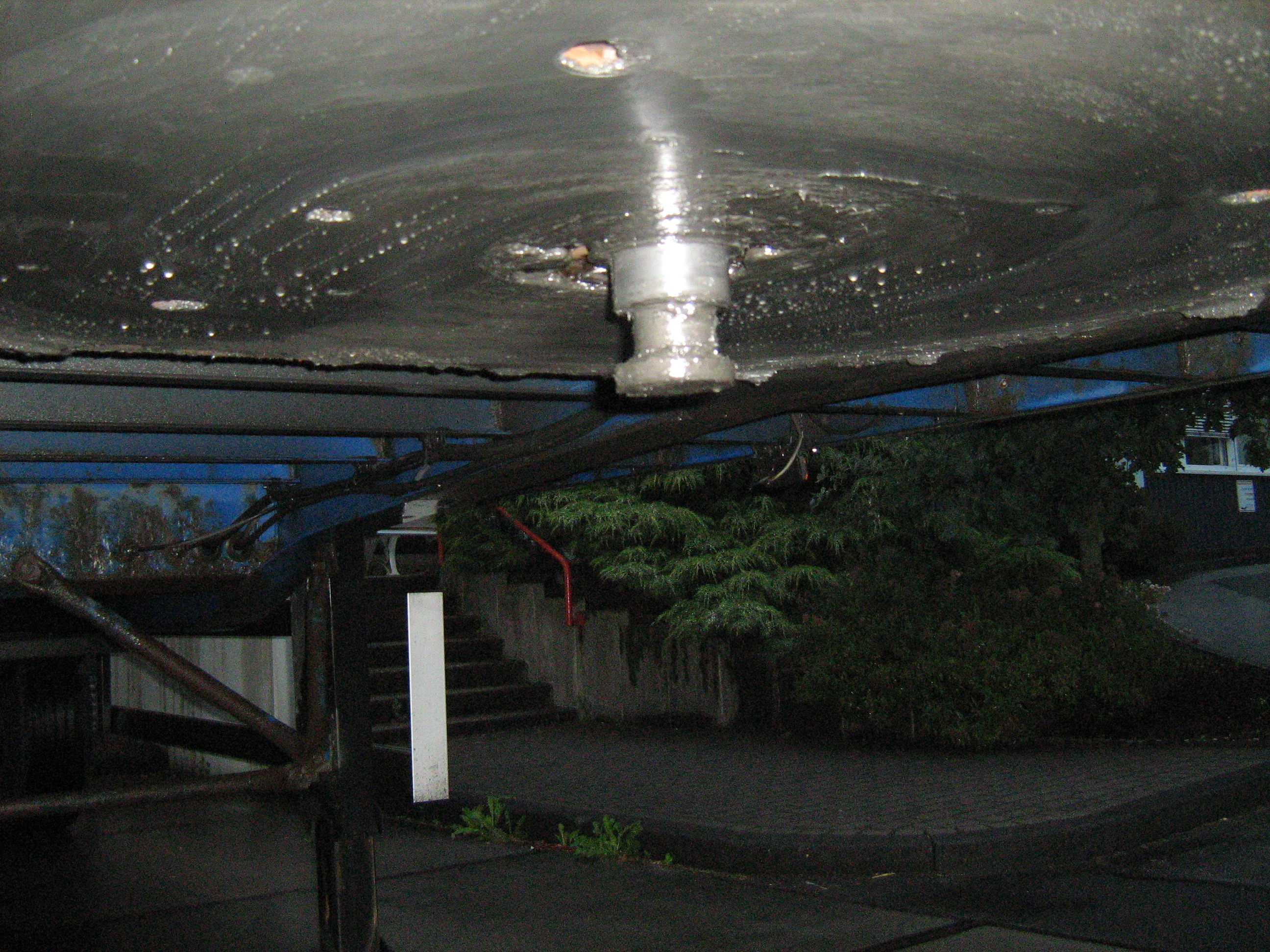 Königszapfen unter dem Auflieger bzw. für die Sattelkupplung